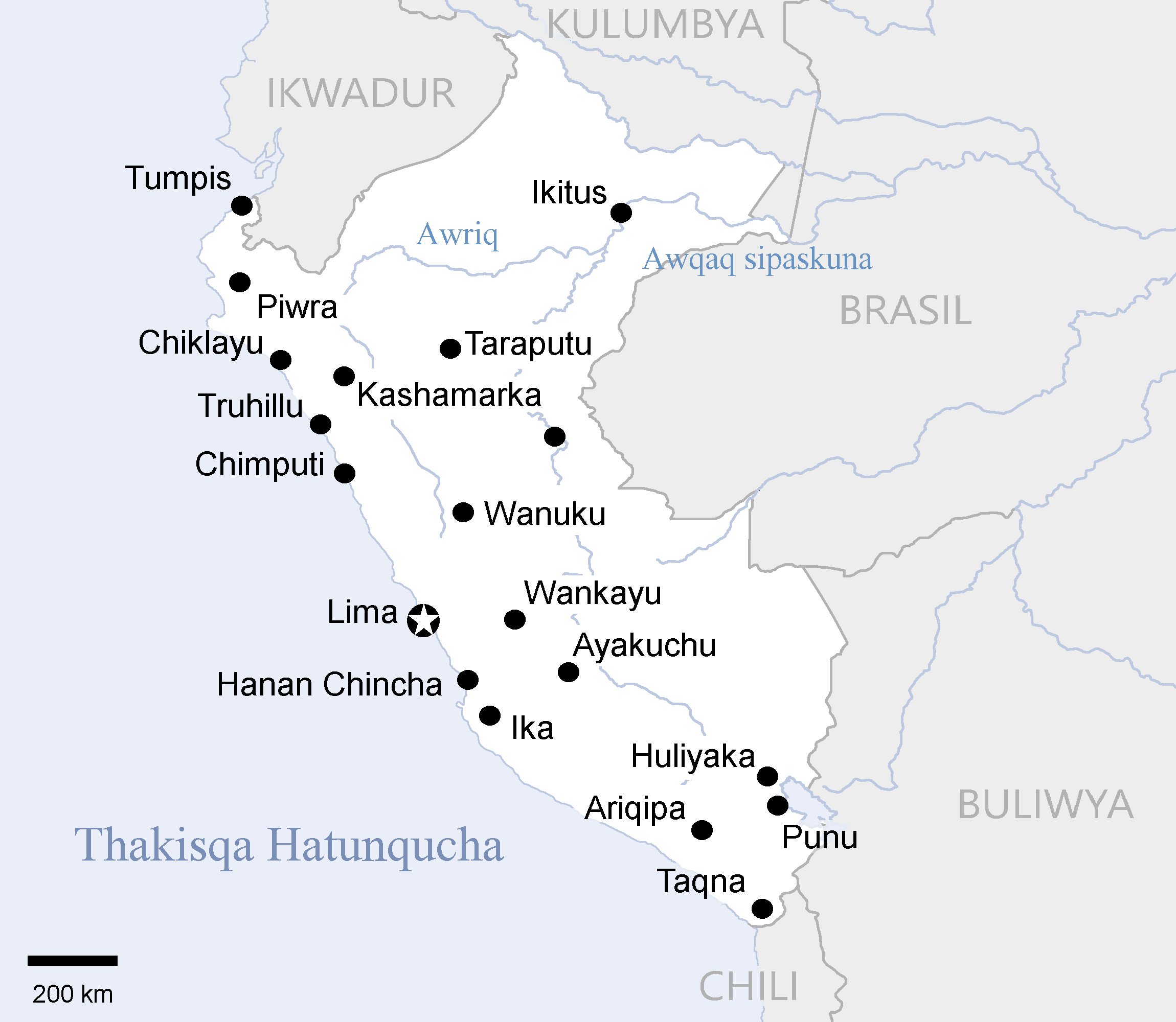 Runa Simi: Kichwa Piruw saywitu